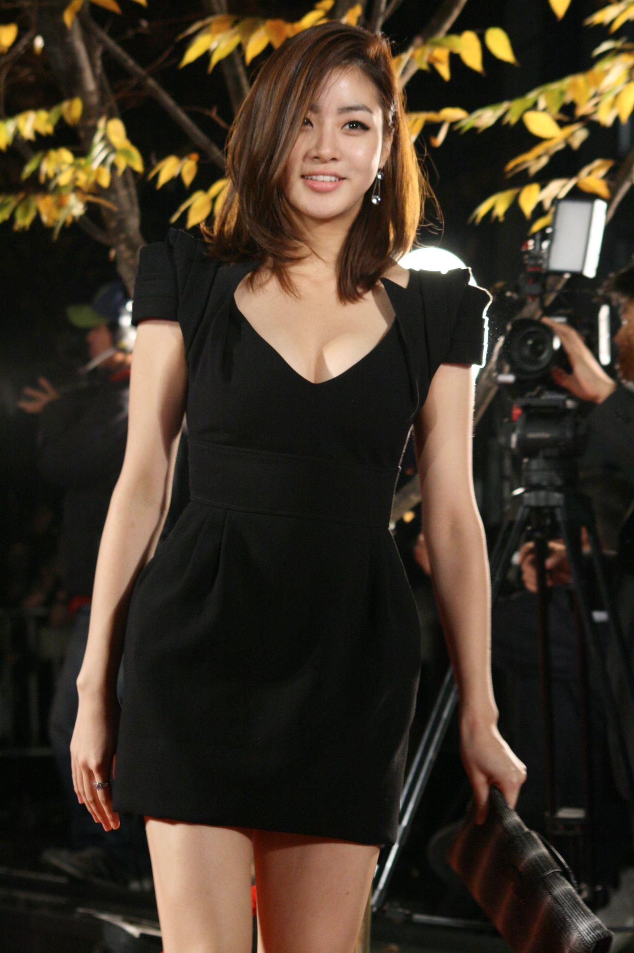 2011인디브랜드페어&2011스타일아이콘어워즈 1519